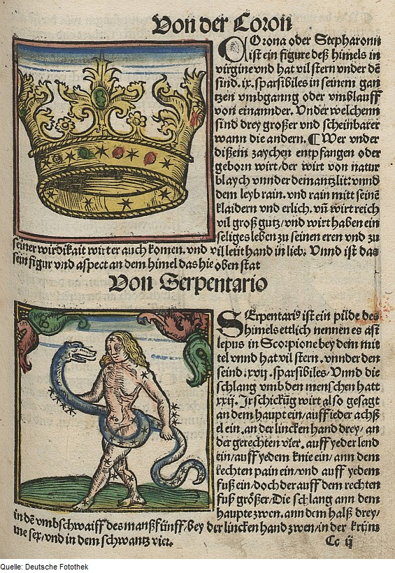 Original image description from the Deutsche Fotothek Astronomie & Sternbild